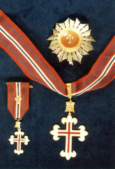 Medalha de mérito militar